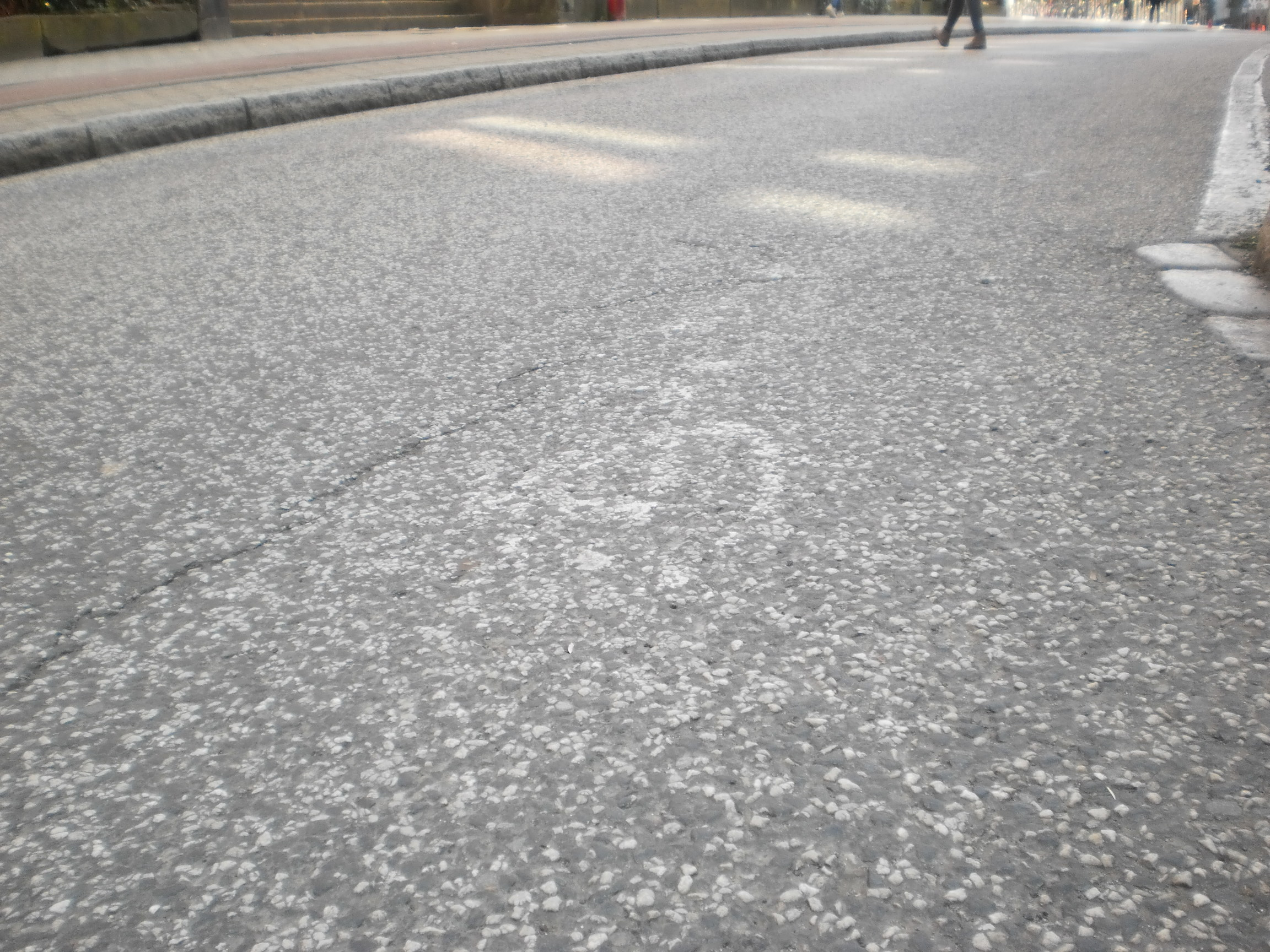 Abgefahren und ziemlich weg, 1. April doch wohin sind die Fahrradfahrer*innen in Marburg? Grauer Asphalt nahe der Unibibliothek am Pilgrimstein ohne Piktogramm mit Fahrrad, vielleicht auch zuviel Mikroplastik für die Flüsse und Meere ...